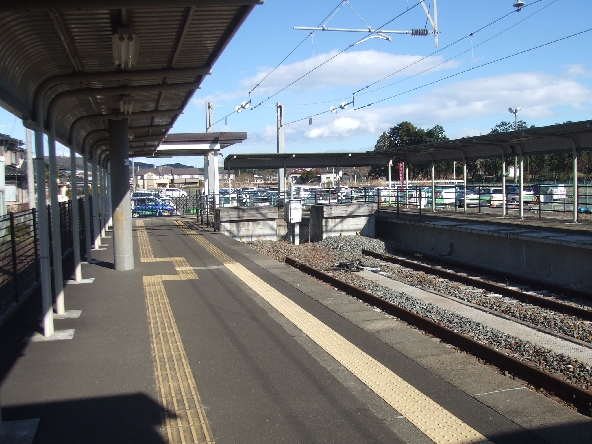 利府駅 線路終端